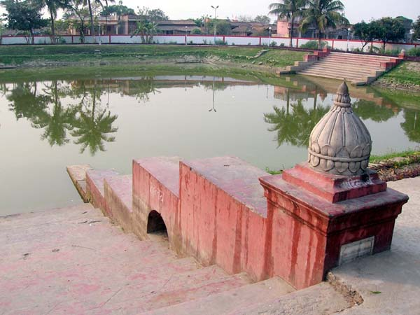 सीतामढ़ी के पुनौरा स्थित जानकी कुंड